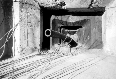 Eine zerstörte Kanone der Kasematte Vise 1, von mir selbst in SW fotografiert